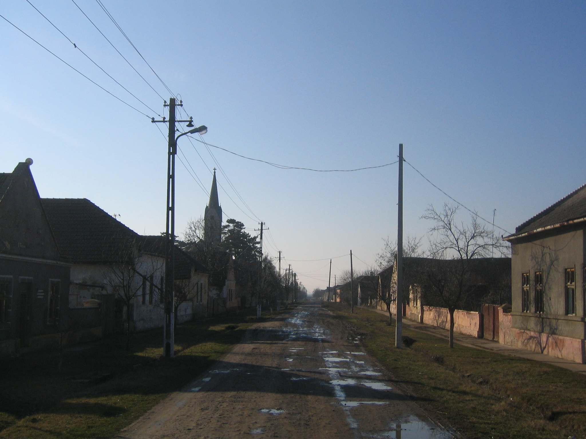 Uliță în Sânpetru Mic, Timiș